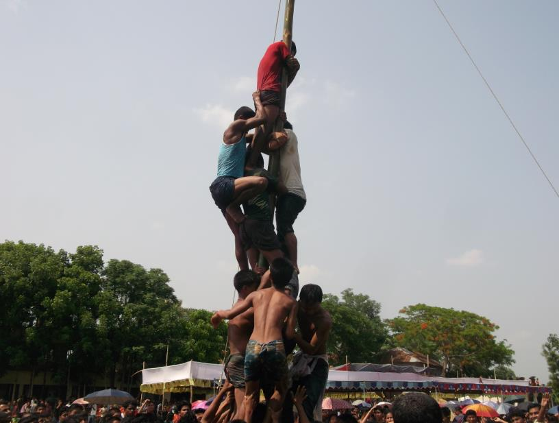 বাশেঁর শীর্ষে থাকা টাকা নেওয়ার জন্য কিছু মারমা তরুনের চেষ্টা